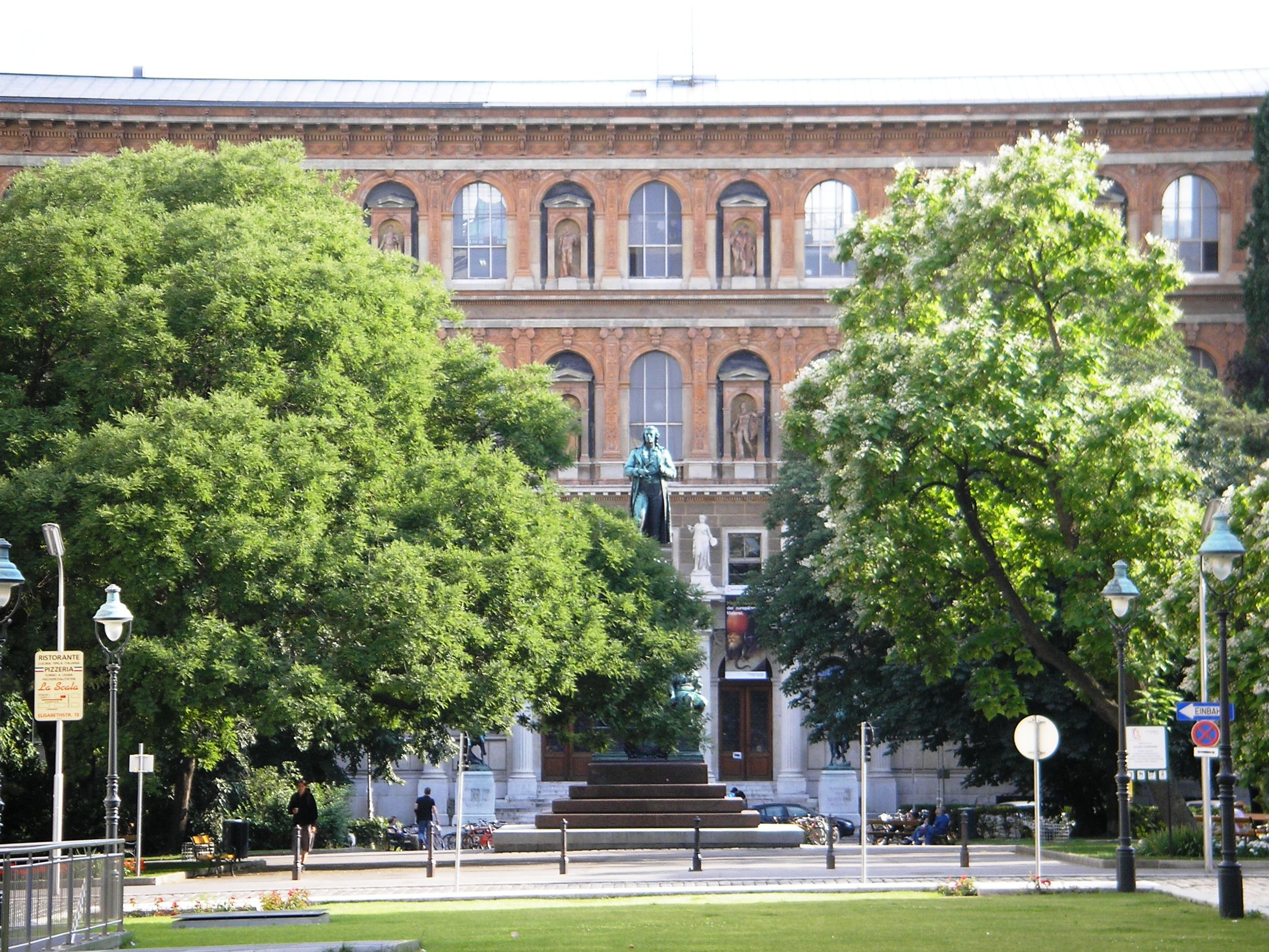 Akademie der Bildenden Künste in Vienna, on Schillerplatz